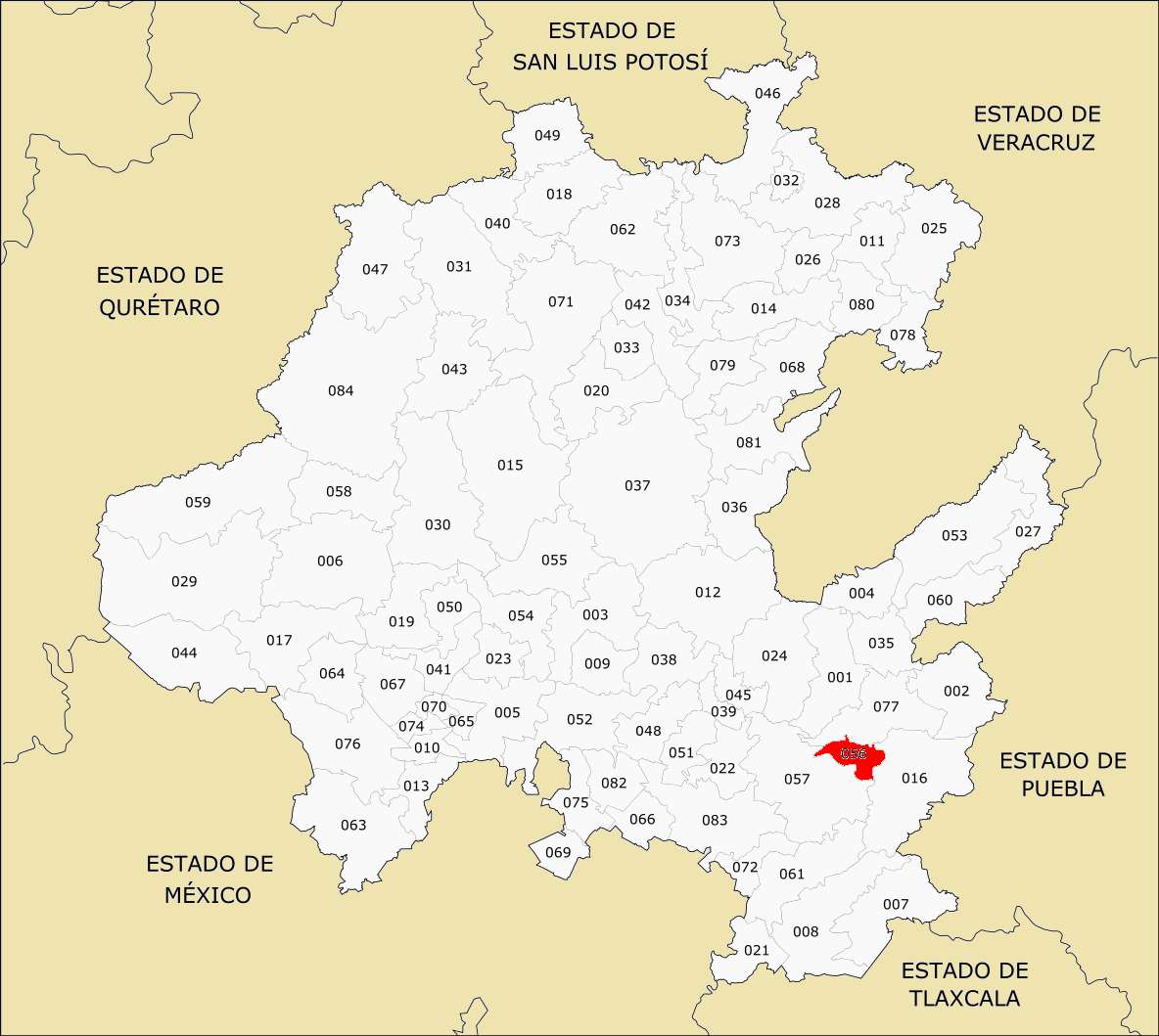 Municipio de Hidalgo